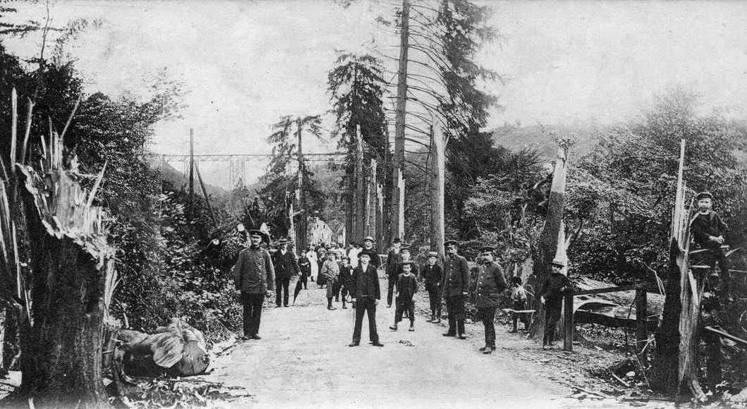 Trees broken by storm in Müngsten on 14 August 1906